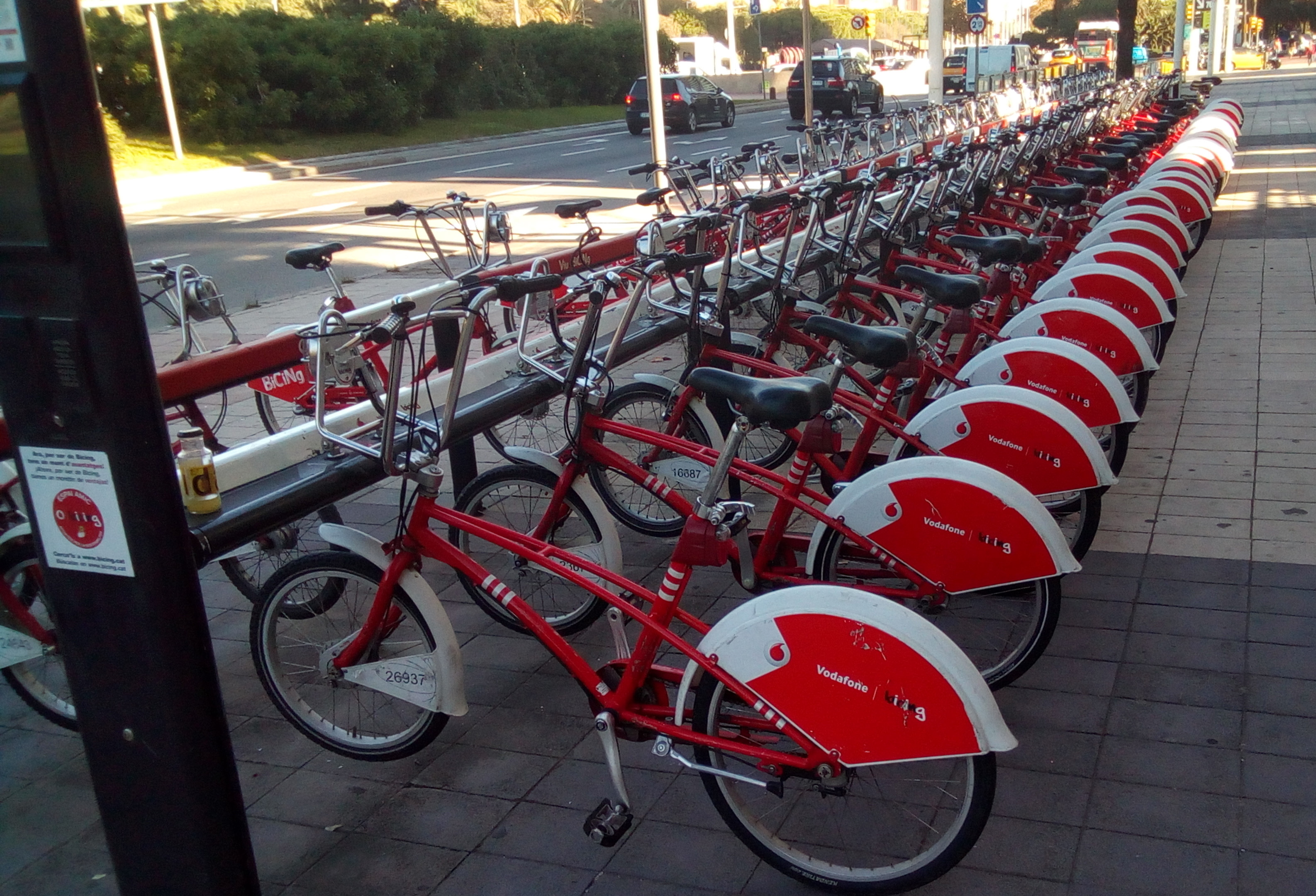 Estación de Bicing, Barcelona.